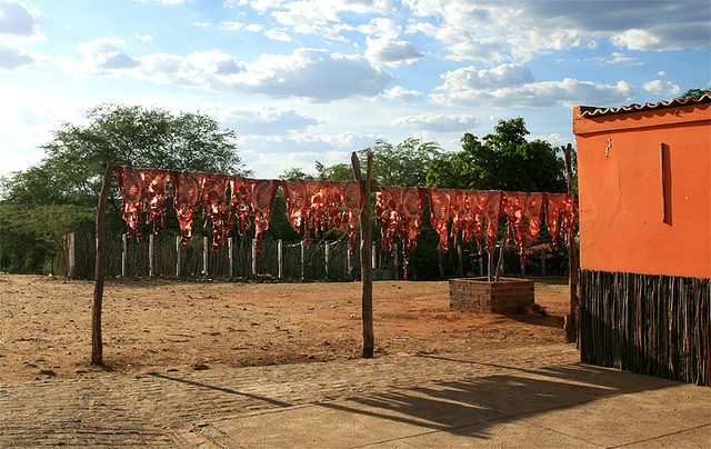 carne seca, jabá, carne do sertão